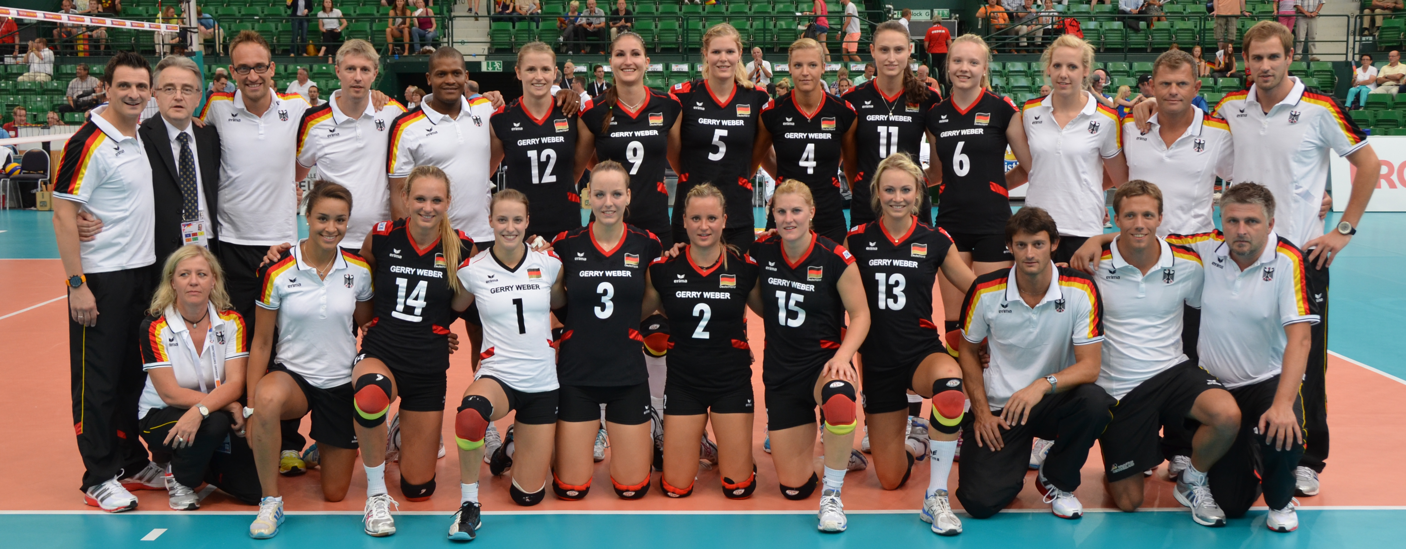 Volleyball-Nationalmannschaft der Frauen 2013